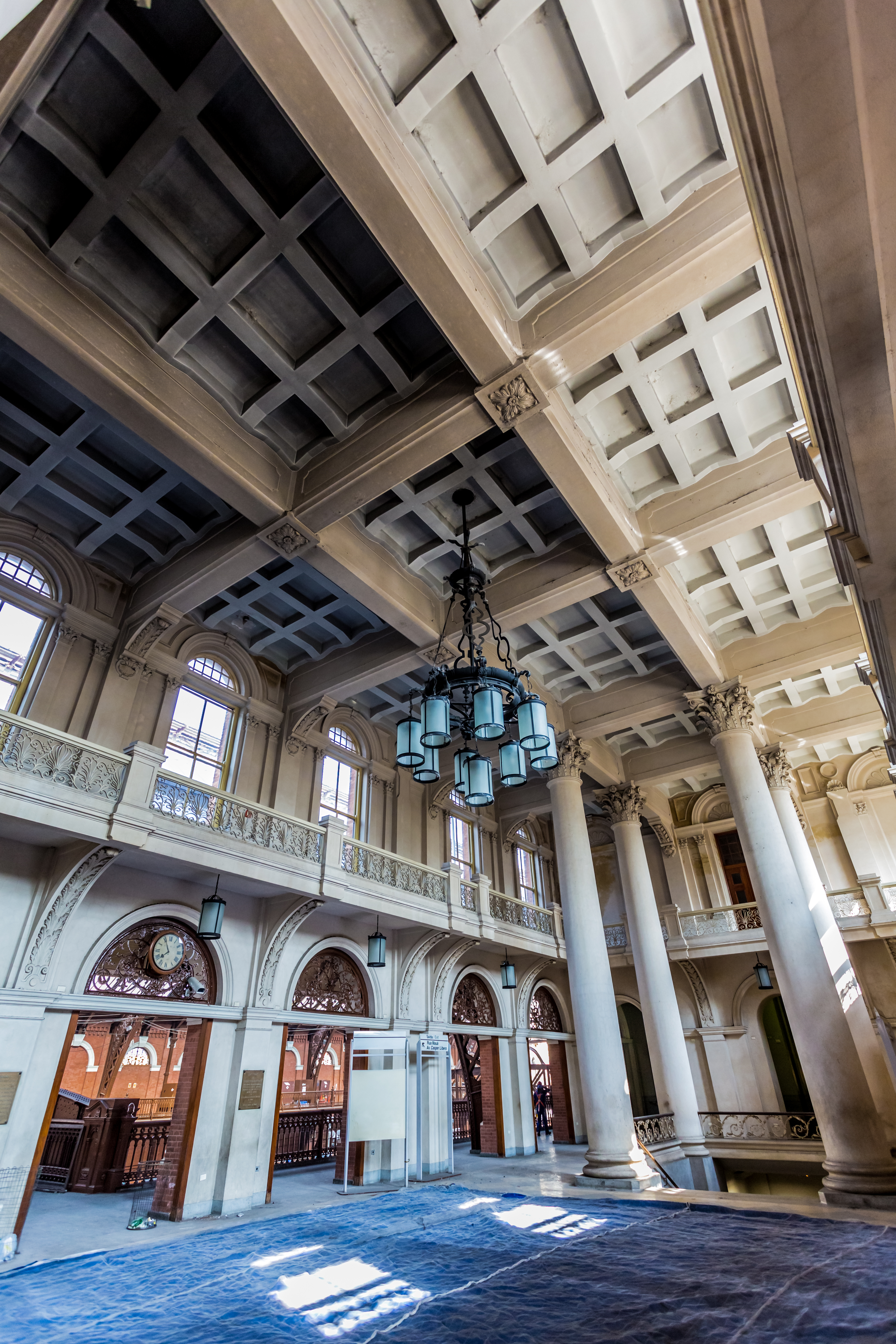 Estação da Luz